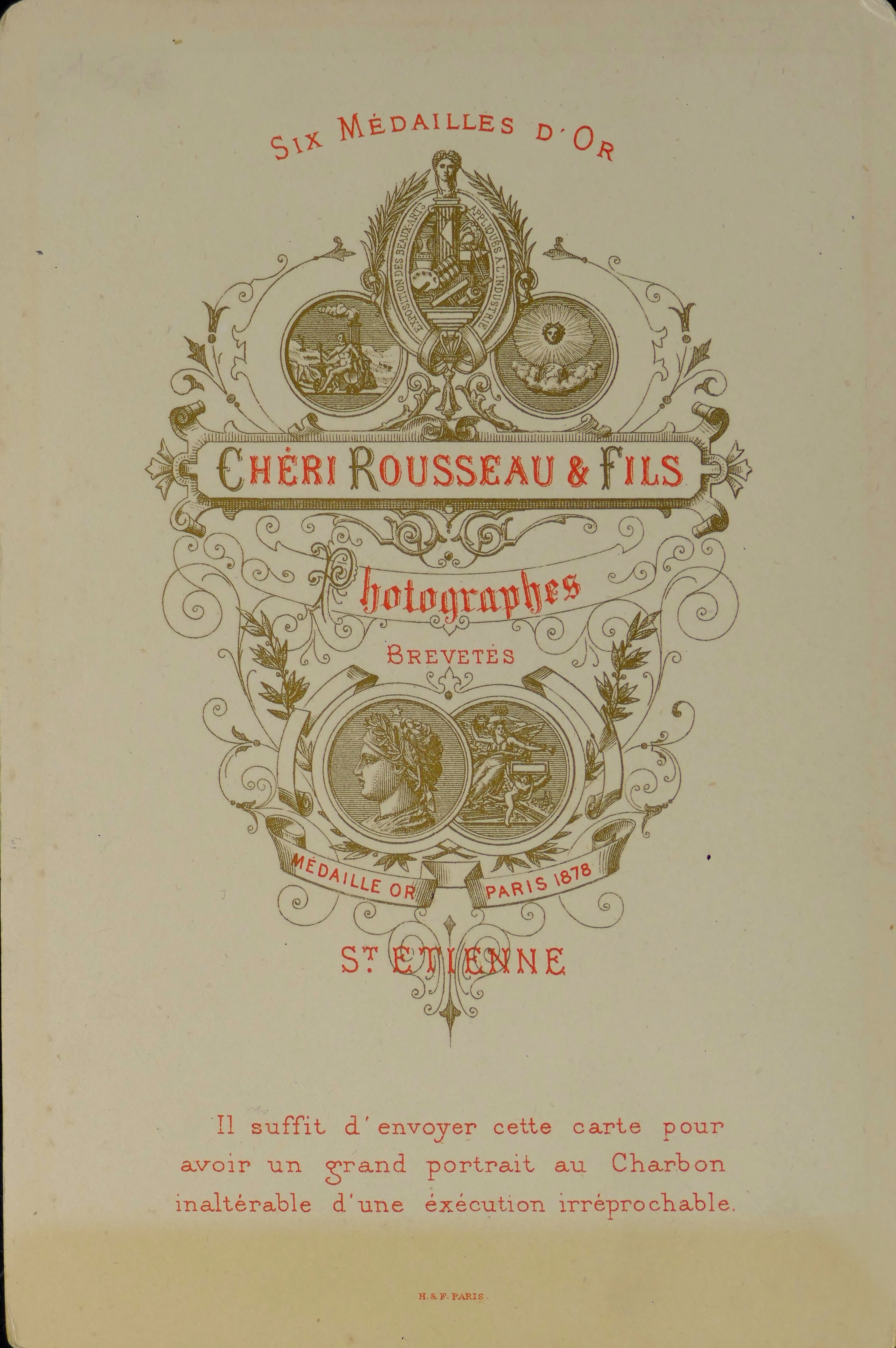 Enfant assis en costume chinois, portrait anonyme, dos du carton carton dinensions cabinet (16x10,5 cm). Photographe François Chéri-Rousseau, vers 1890. Collection personnelle.